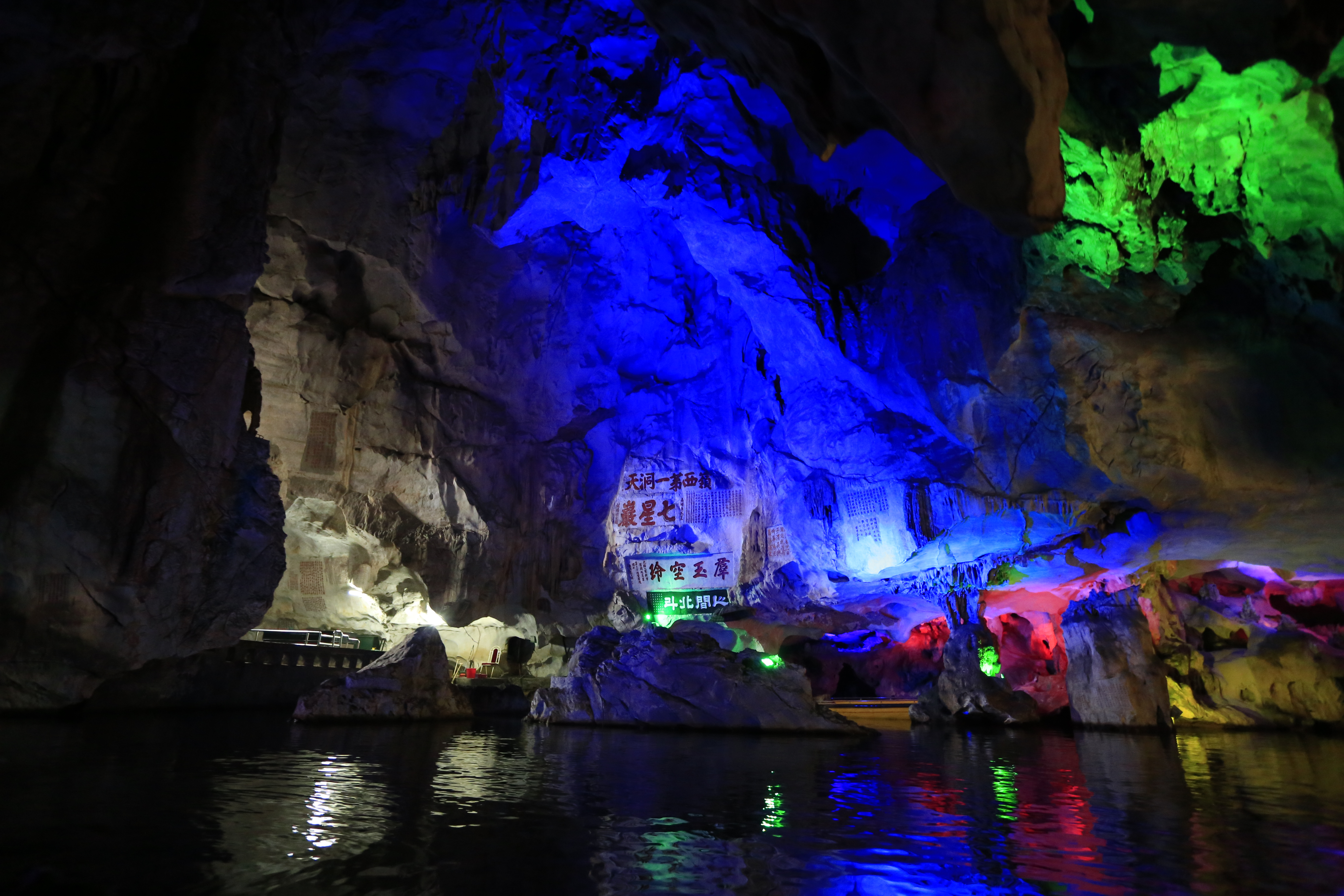 肇庆七星岩摩崖石刻